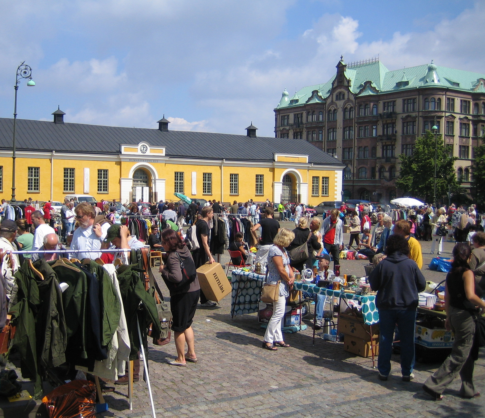 Flea market at Drottningtorget, Malmö